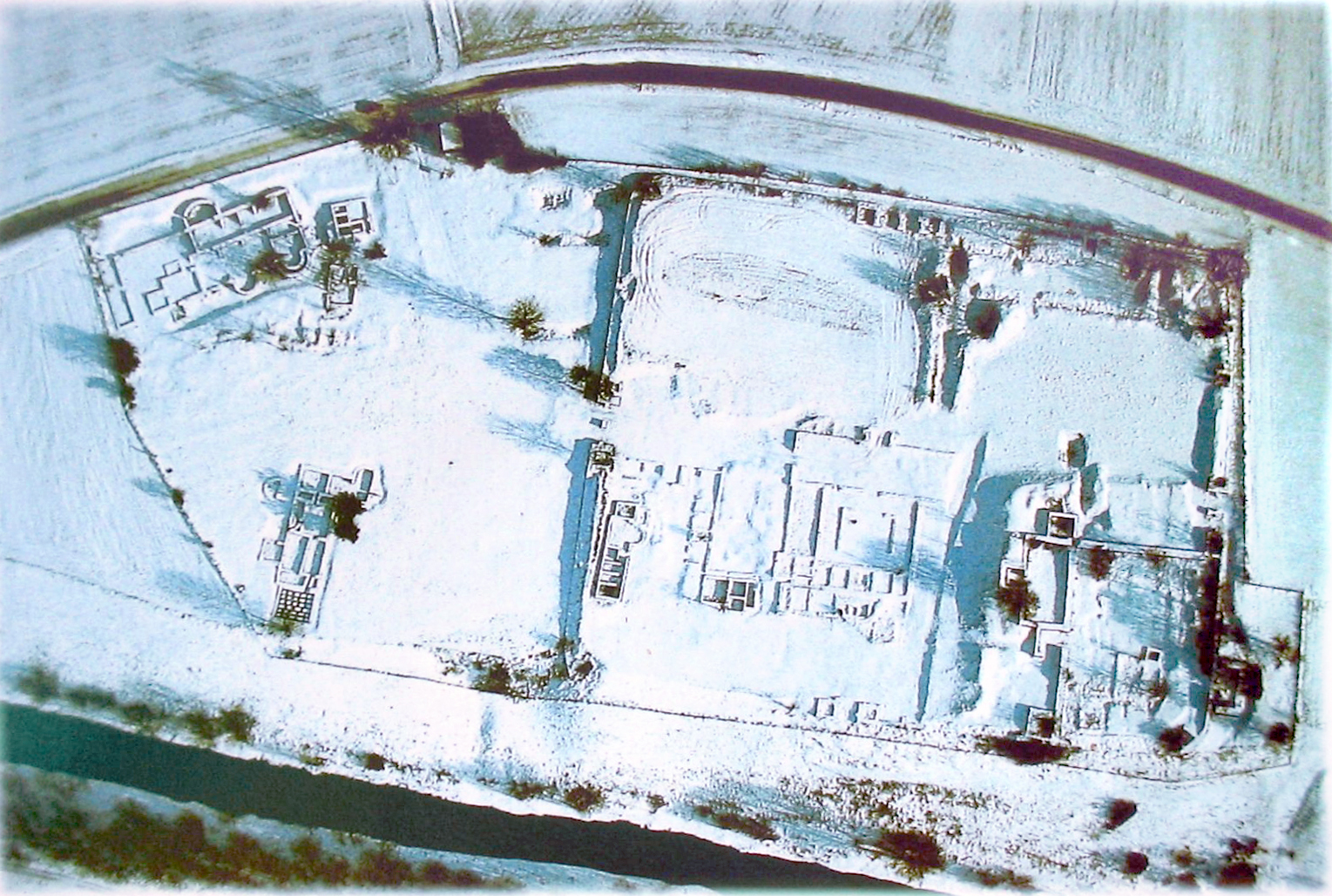 Luftaufnahme von Kastell Eining